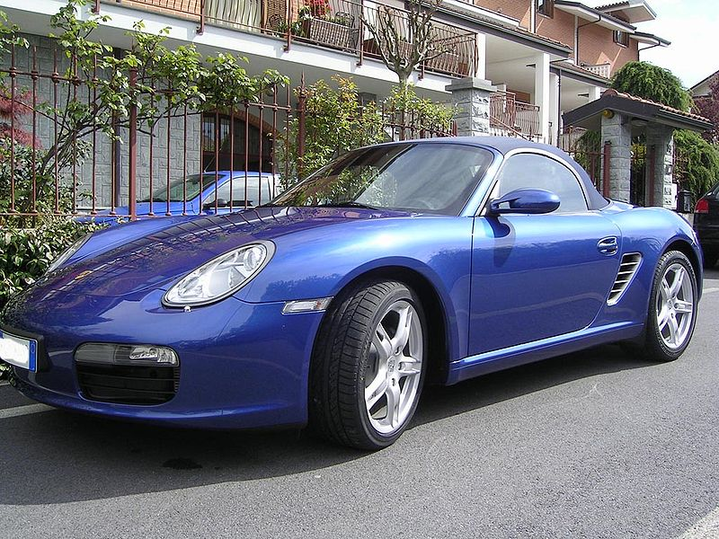 Puffetta (vista anteriore)